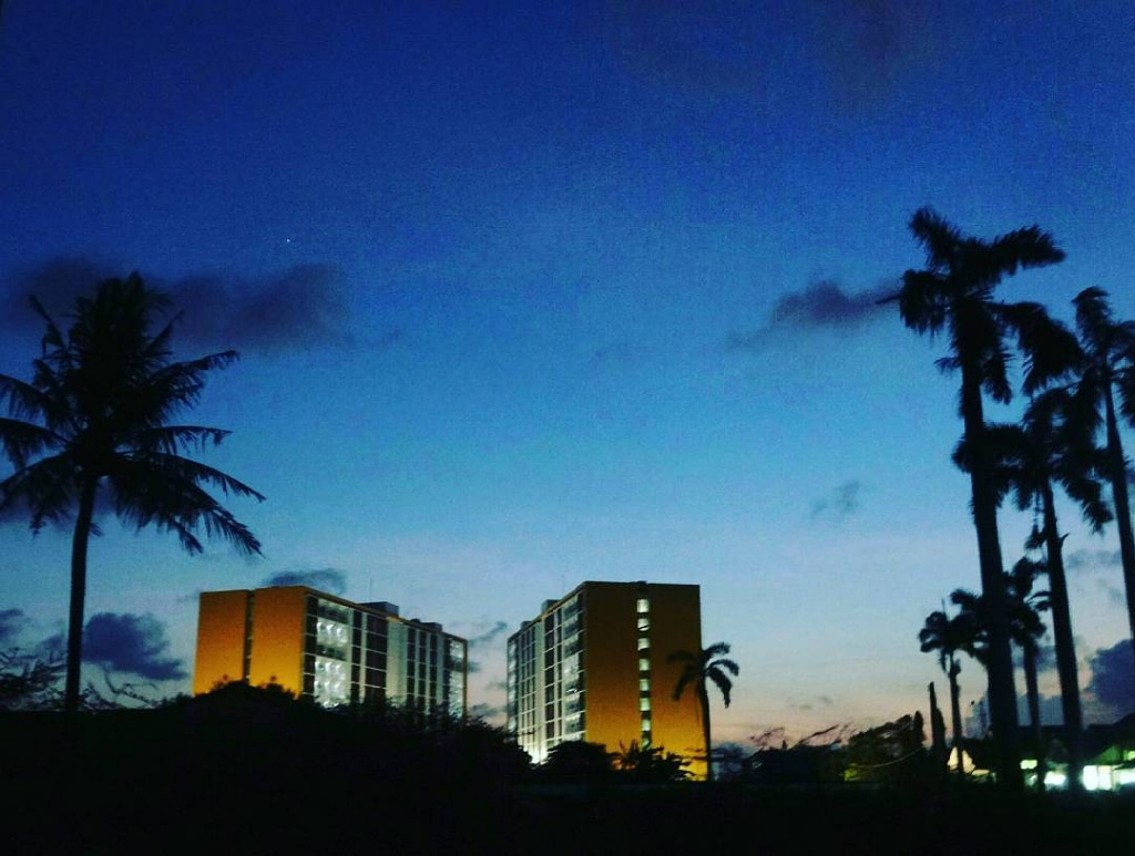 Apartment Patra Lomanis merupakan apartment yang diperuntukan bagi karyawan pertamina